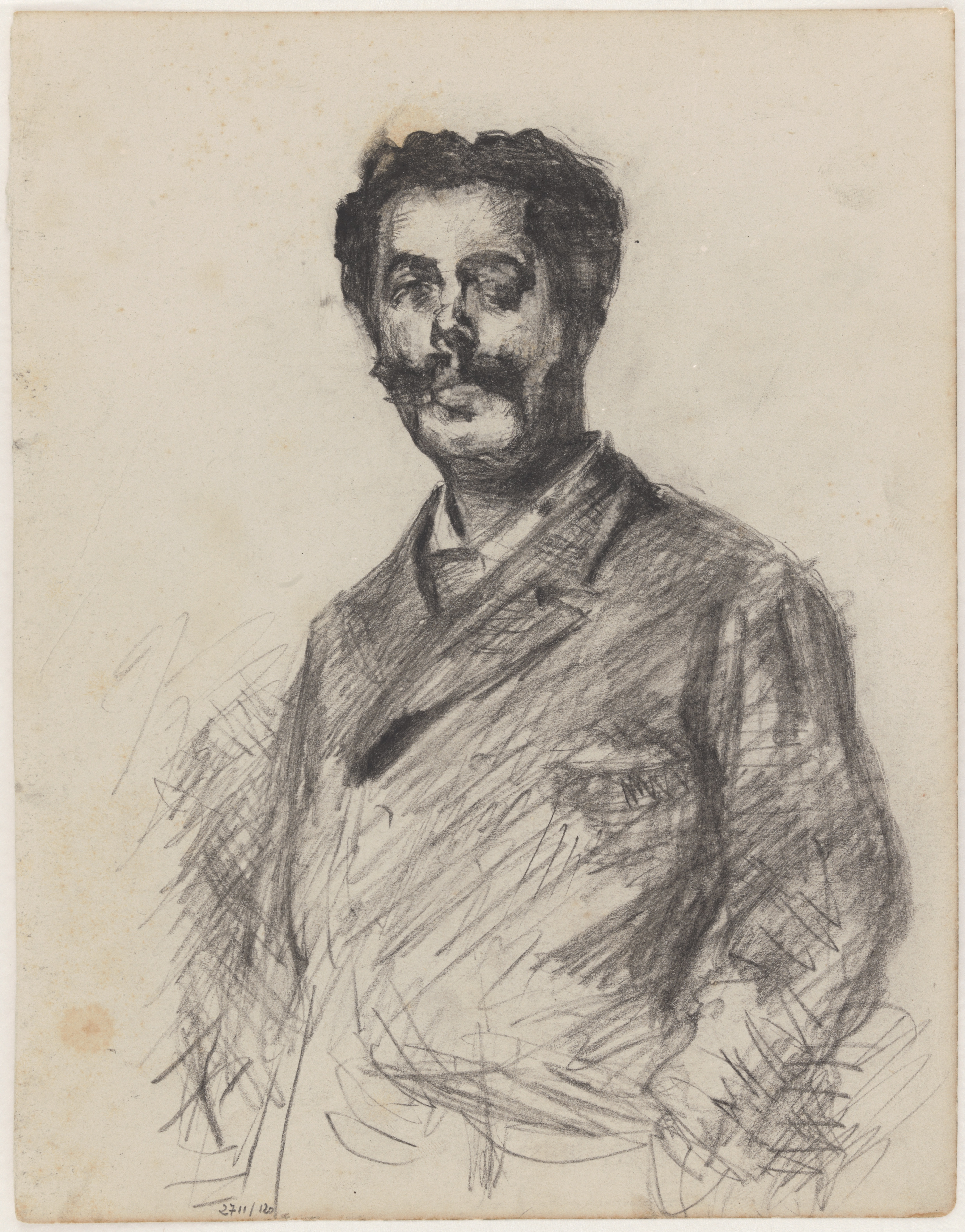 De journalist Paul de Cassagnac, (James Ensor, circa 1880-1890); collection: Koninklijk Museum voor Schone Kunsten Antwerpen